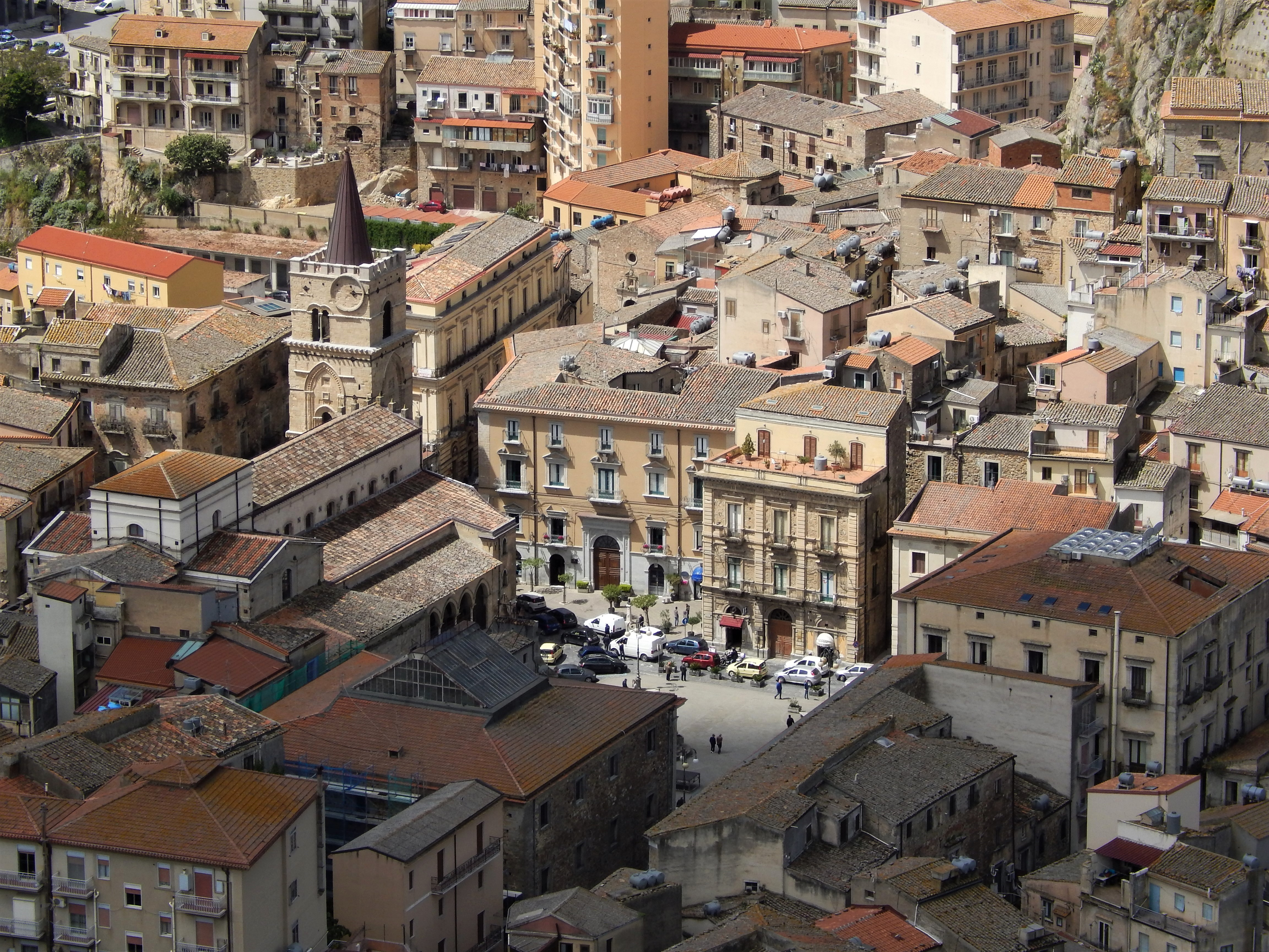 scorcio panoramico di Nicosia di Sicilia